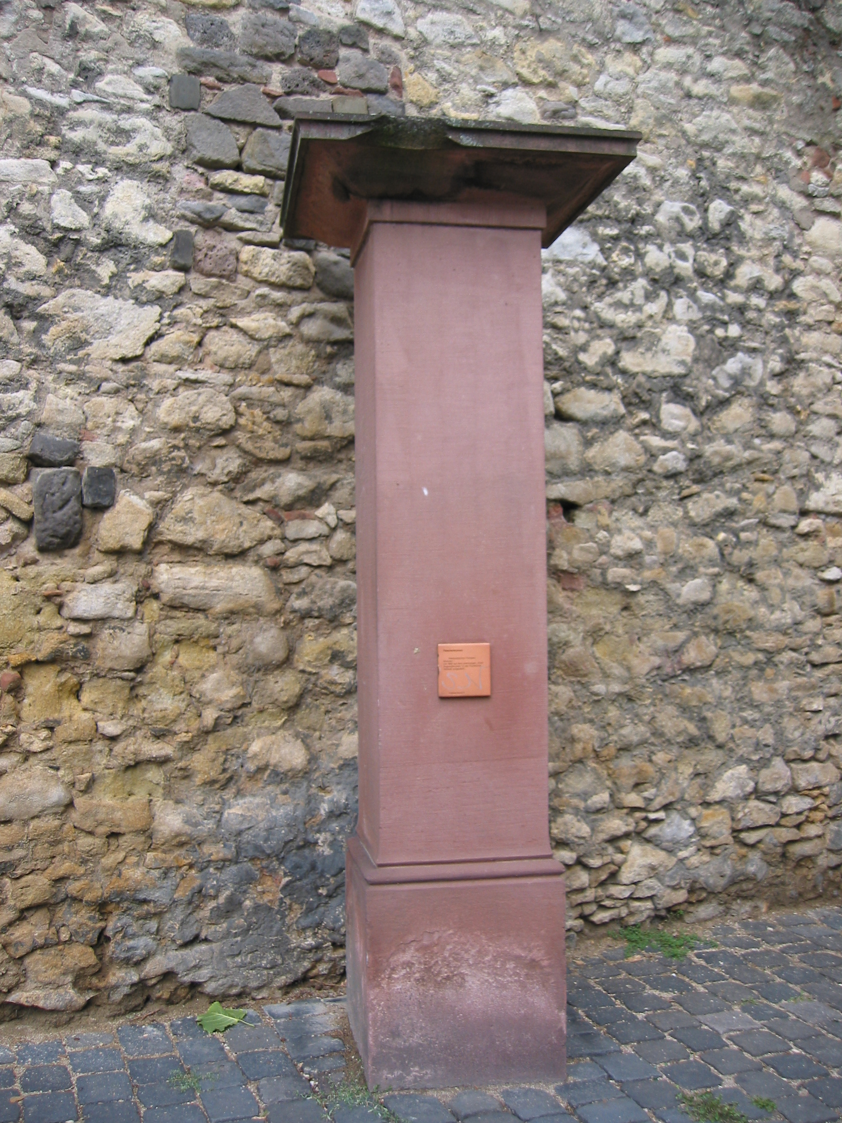 Fleischerbrunnen in Frankfurt am Main * Canon PowerShot S40